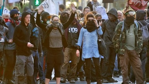 Manifestation Albi (Tarn)